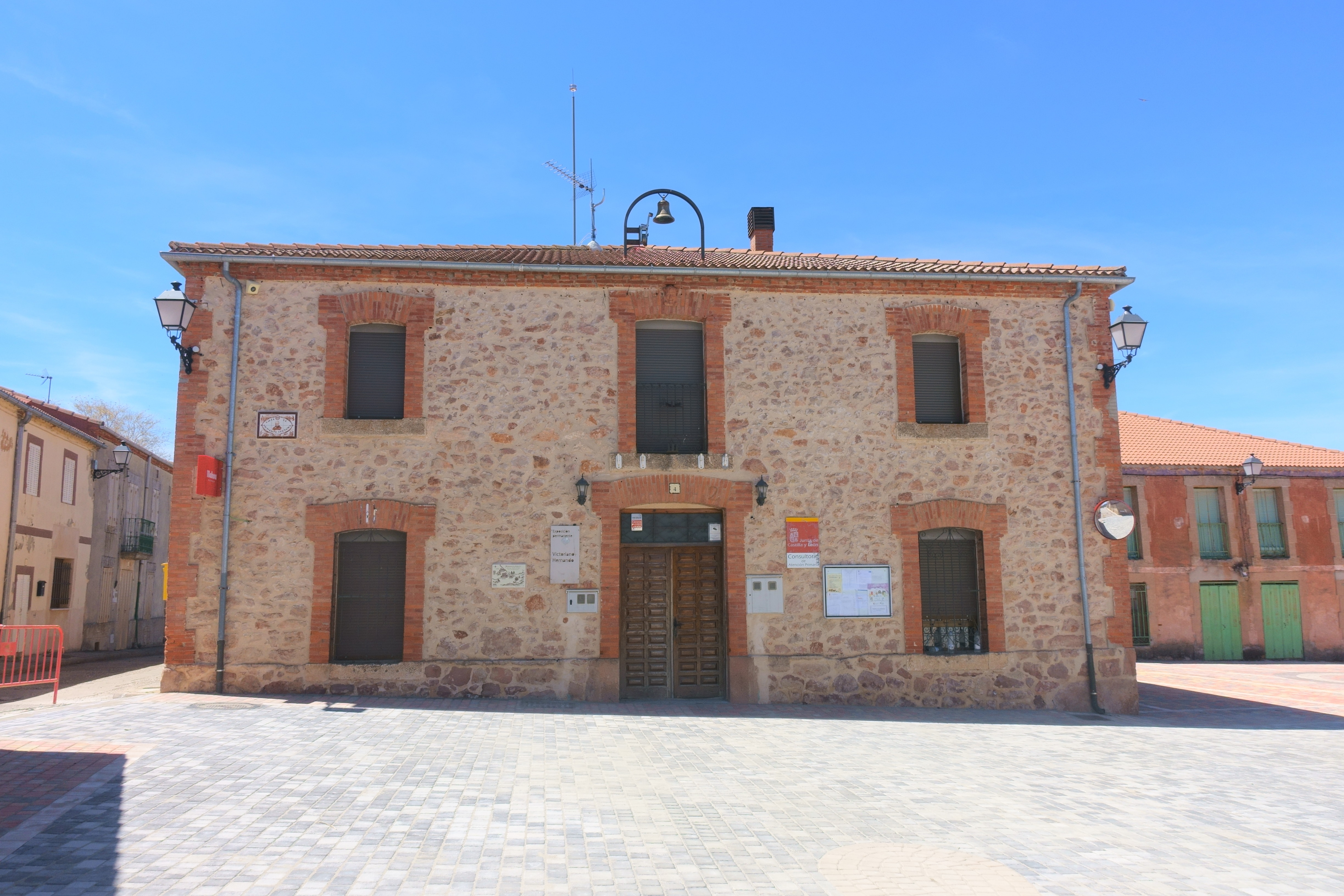 Casa consistorial de Aldeanueva de la Serrezuela (Segovia, España).